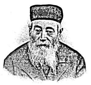 יעקב ליפשיץ, מזכירו של הרב יצחק אלחנן ספקטור